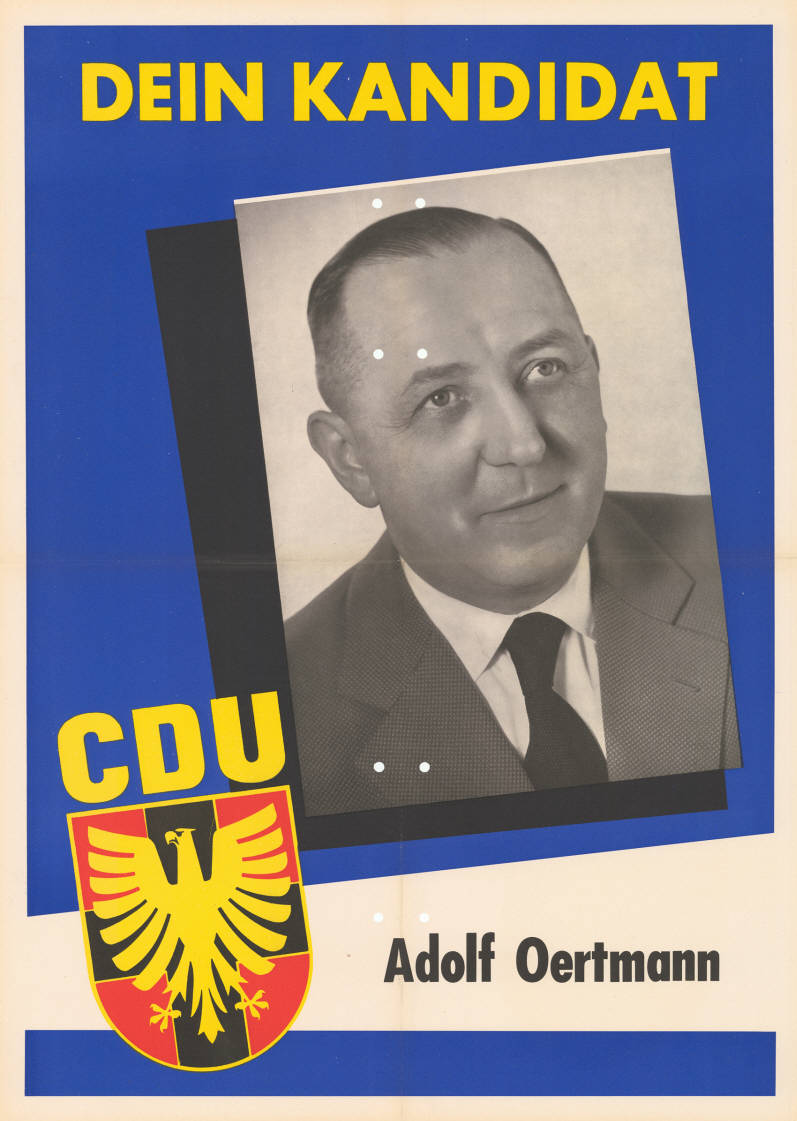 Dein Kandidat CDU Adolf Oertmann Abbildung: Porträtfoto - CDU-Logo Plakatart: Kandidaten-/Personenplakat mit Porträt Objekt-Signatur: 10-009 : 374 Bestand: Landtagswahlplakate Nordrhein-Westfalen (10-009) GliederungBestand10-18: Landtagswahlplakate Nordrhein-Westfalen (10-009) » Landtagswahl am 6.7.1958 » CDU » mit Porträt-Foto Lizenz: KAS/ACDP 10-009 : 374 CC-BY-SA 3.0 DE